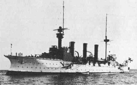 Die deutsche SMS Vineta. Fotografie aus dem Jahre 1904.